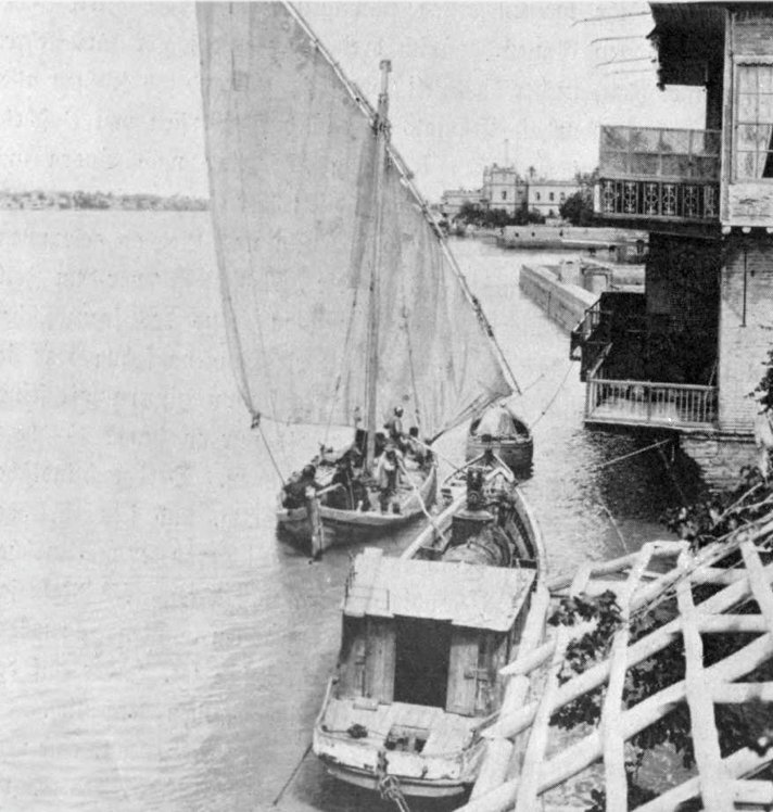 Baghdad, Iraq